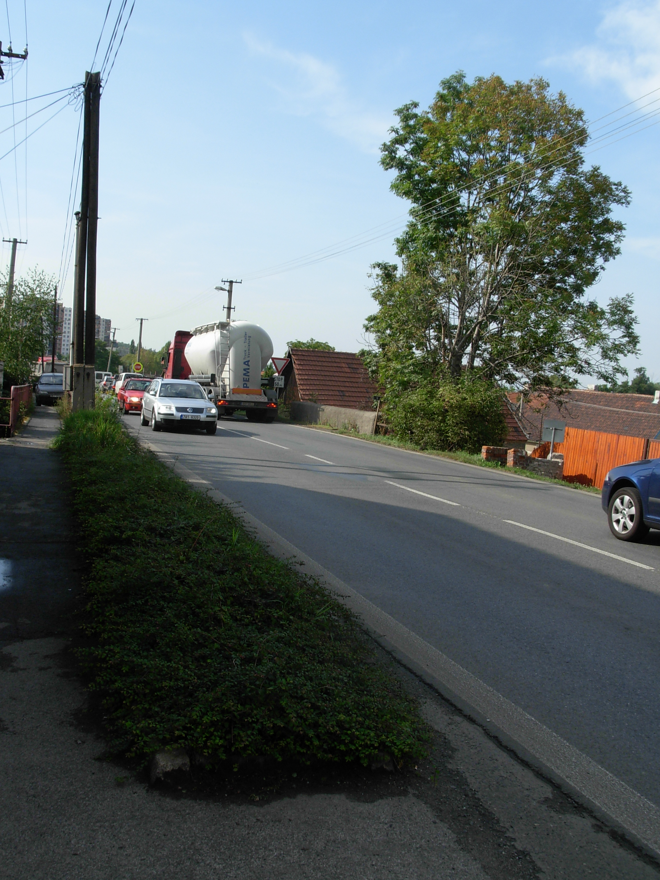 Rousovice, pohled z ulice Mladoboleslavská ku středu města.